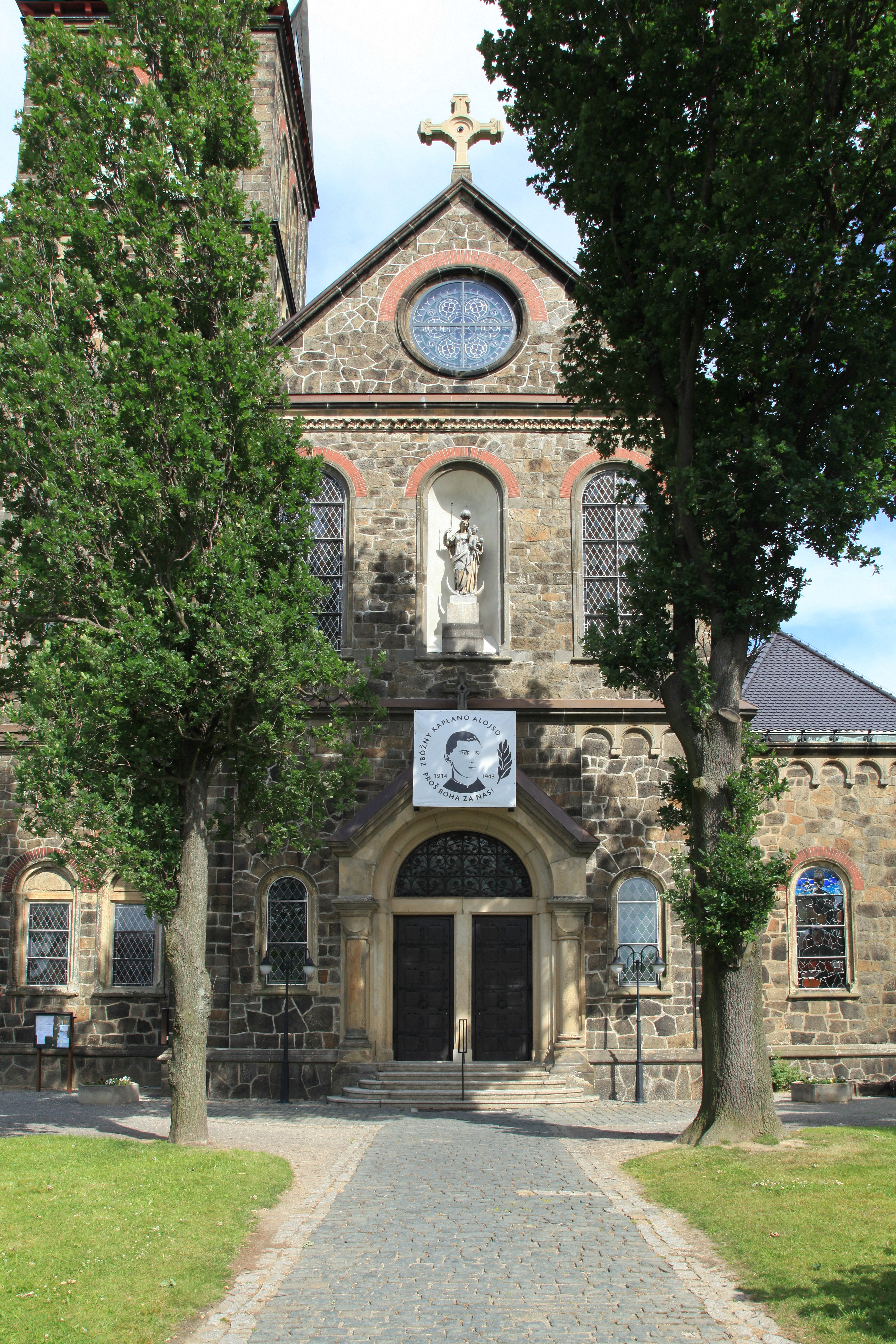 Kirche Maria Rosenkranzkönigin, Dr.-Maria-Grollmuß-Straße in Radibor Hornjoserbsce: Cyrkej swj. Marije, kralowny swjateho róžowca w Radworju